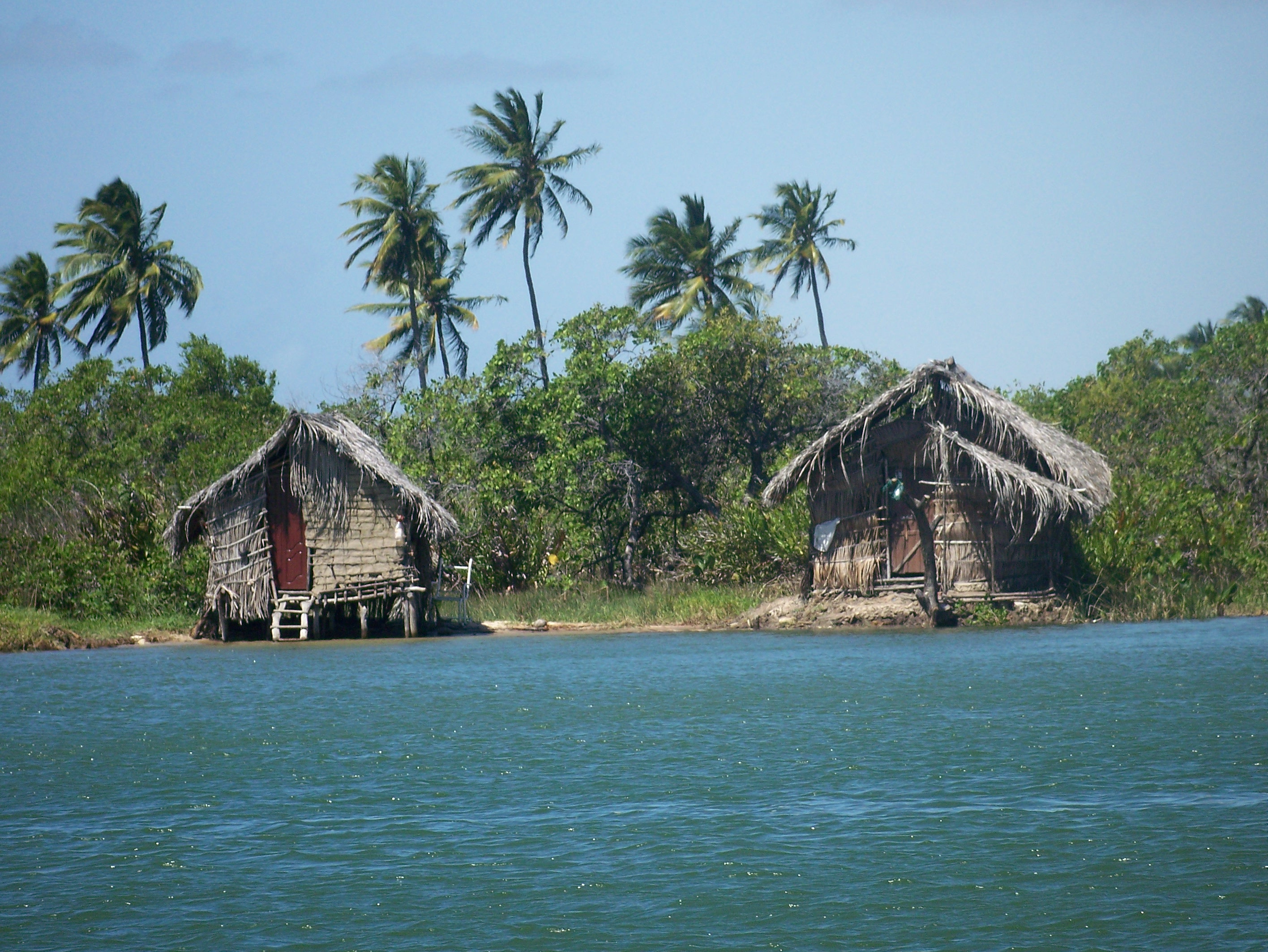 Piaçabuçu - Alagoas